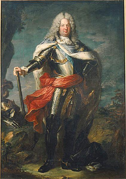 Portrait of Stanisław Leszczyński (1677-1766)